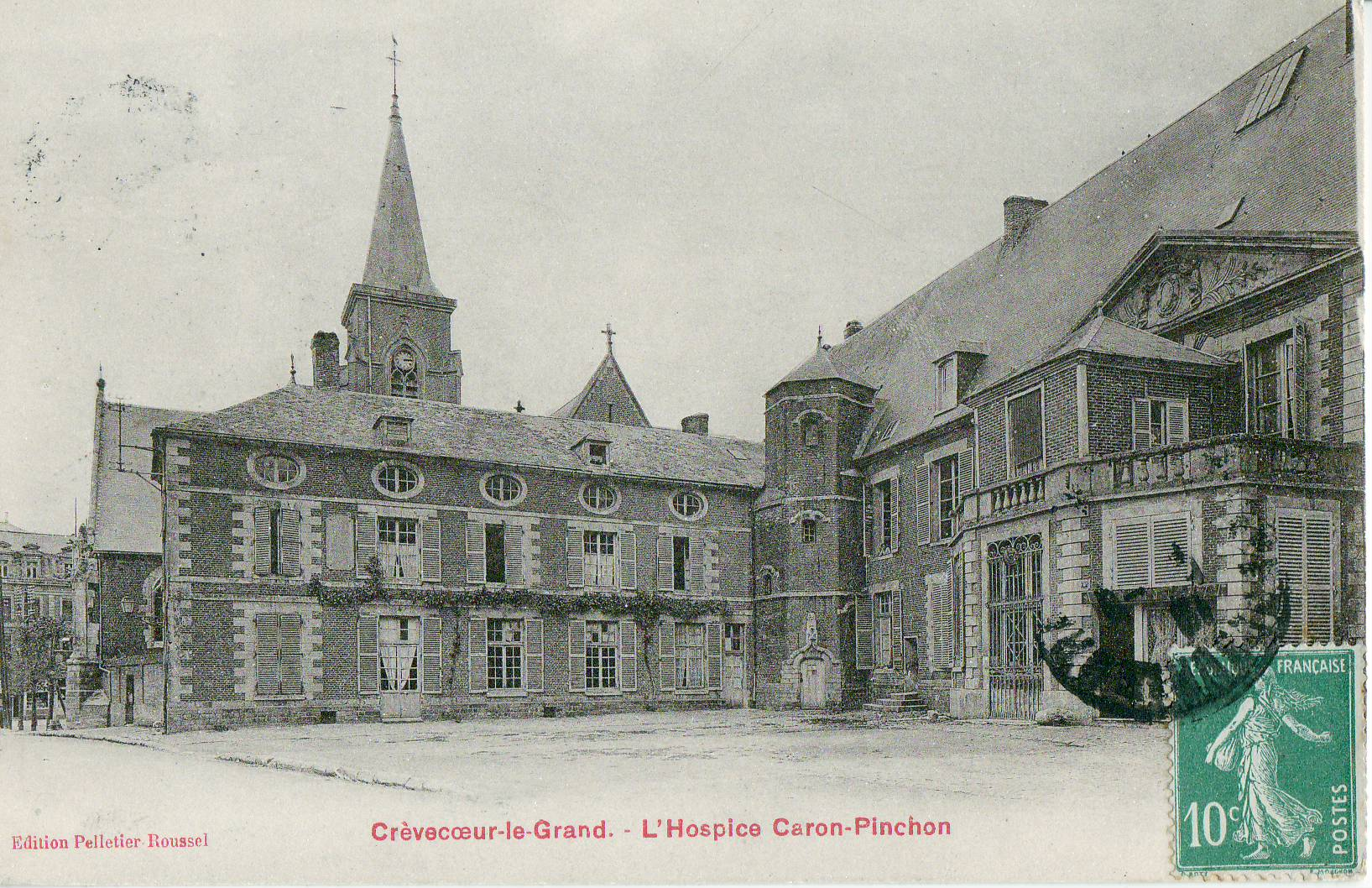 carte postale ancienne éditée par Pelletier-RousselCrèvecœur-le-Grand : L'Hospice Caron-Pinchon